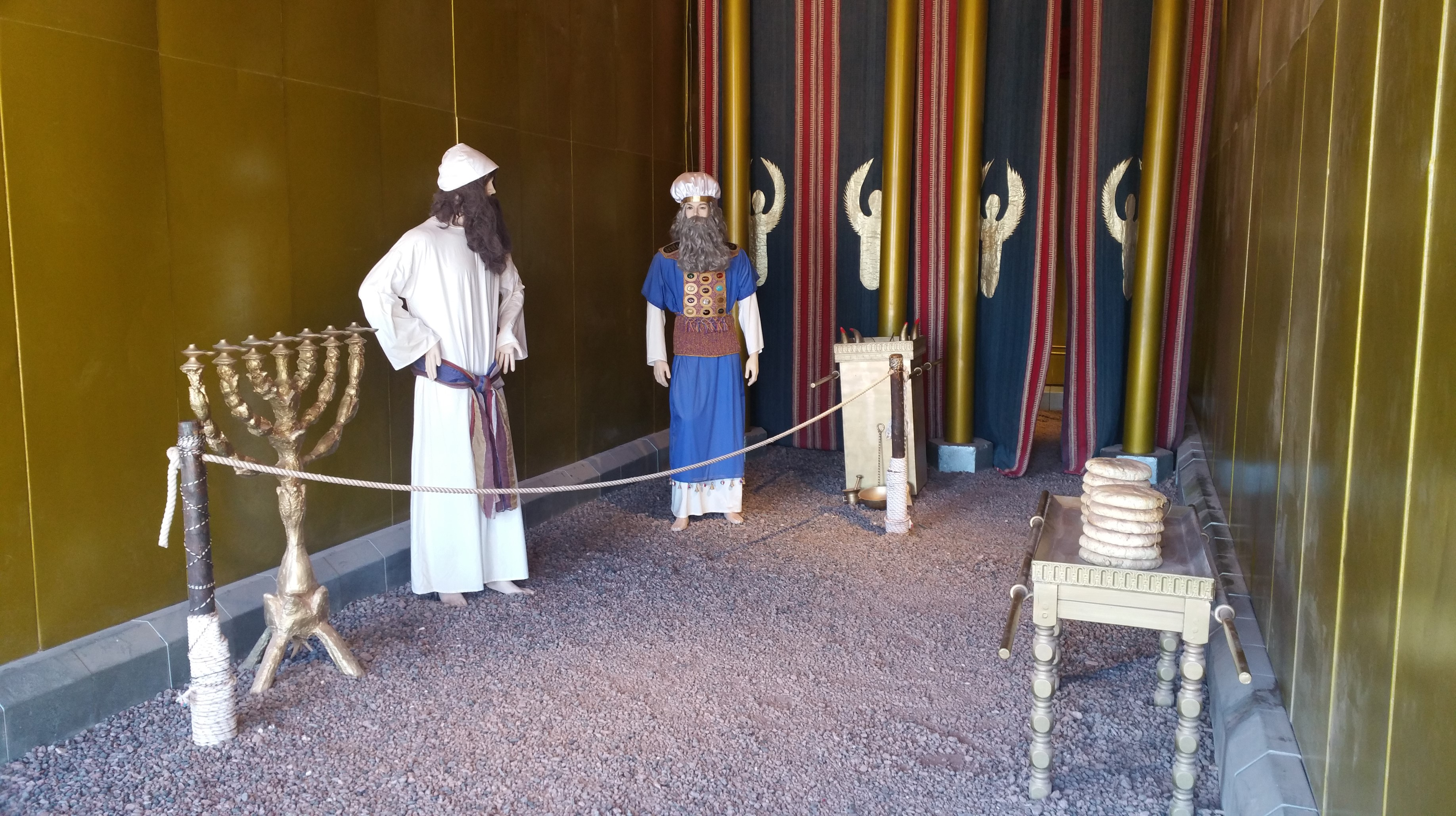 Timna: Stiftshütte, Heiligtum